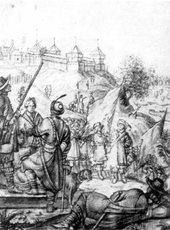 См. название файла.